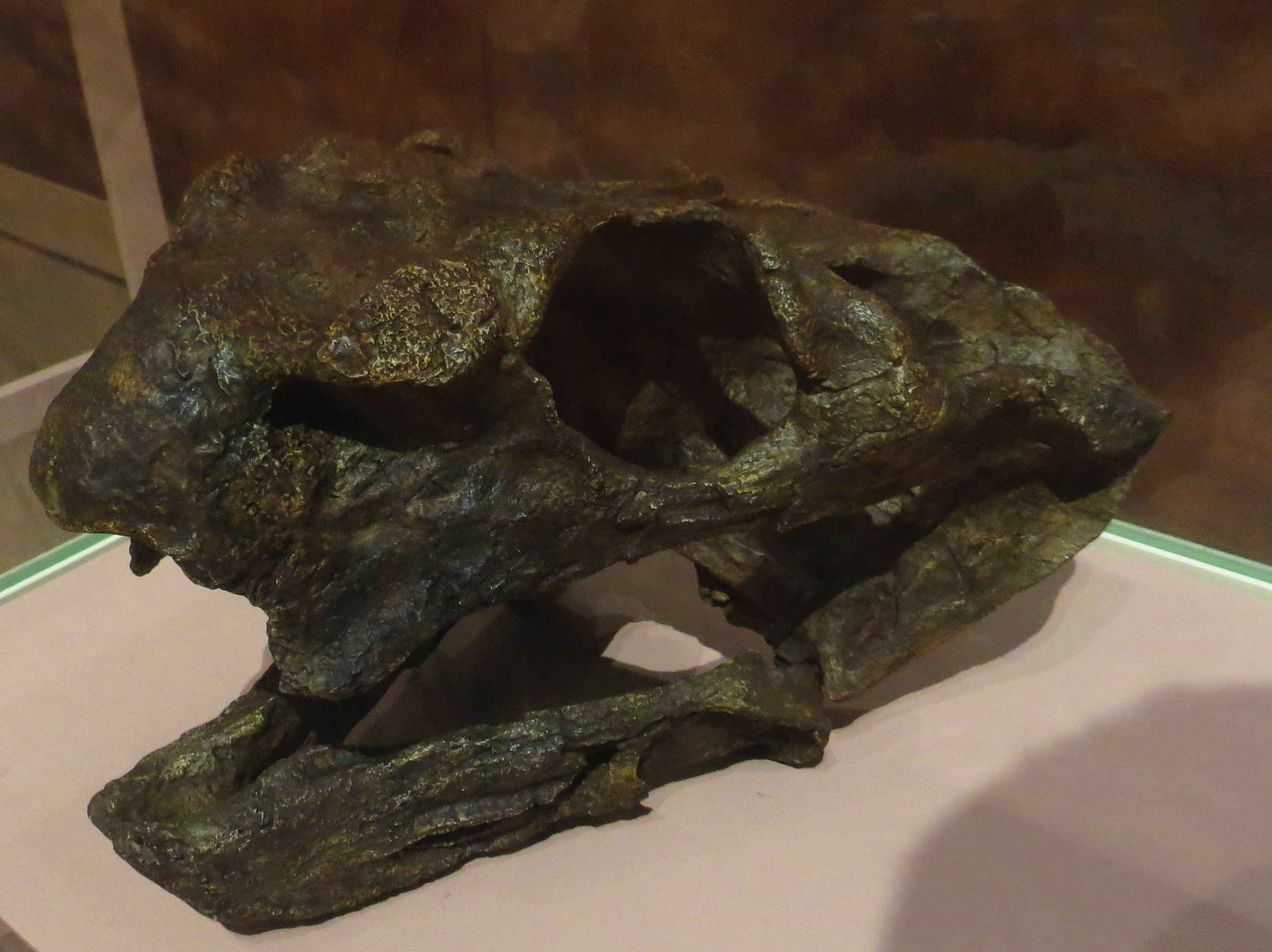 Fossil of Geikia locusticeps, syn. Pelanomodon tuberosus. Took the picture at Museum of Natural History, Karlsruhe